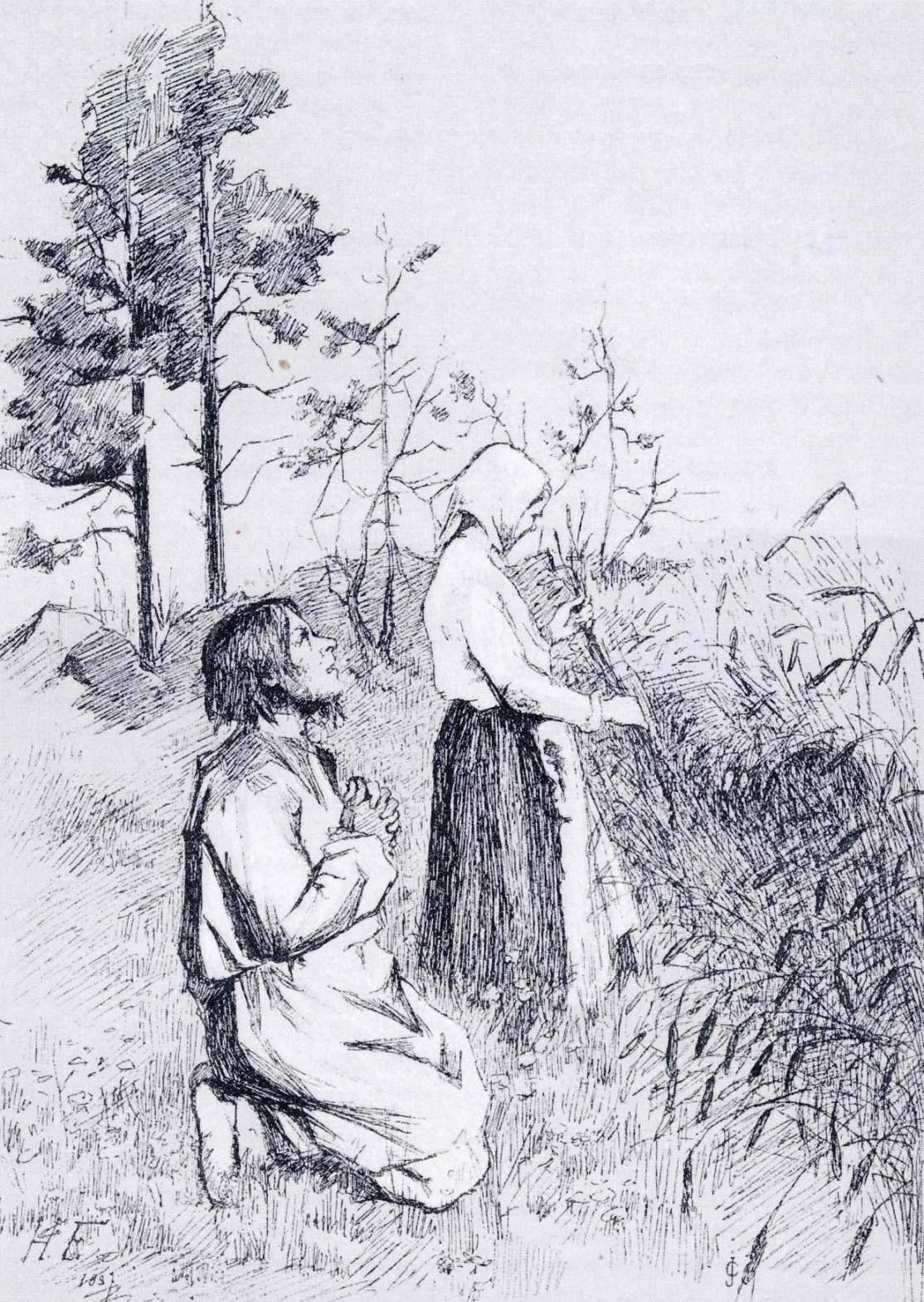 Hanna Frosteruksen kuvitusta Johan Ludvig Runebergin runoon "Saarijärven Paavo", julkaistu alun perin kokoelmassa Idyllejä ja epigrammeja.